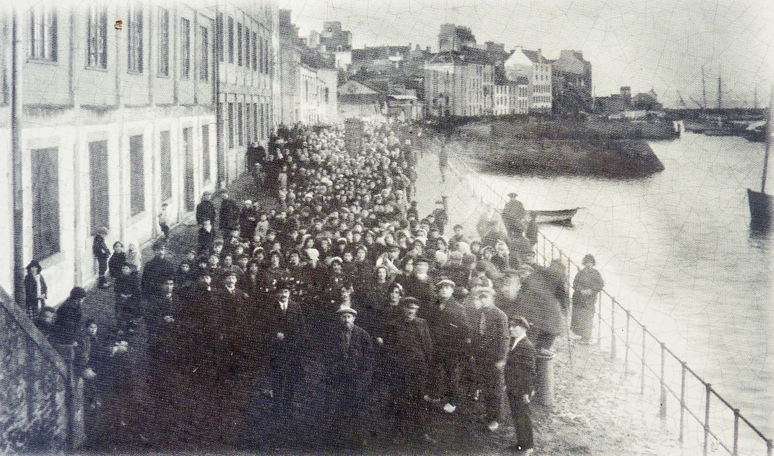 Douarnenez : la manifestation dite triomphale début janvier 1925 devant l'usine rouge (photo panneau d'information touristique à Douarnenez)